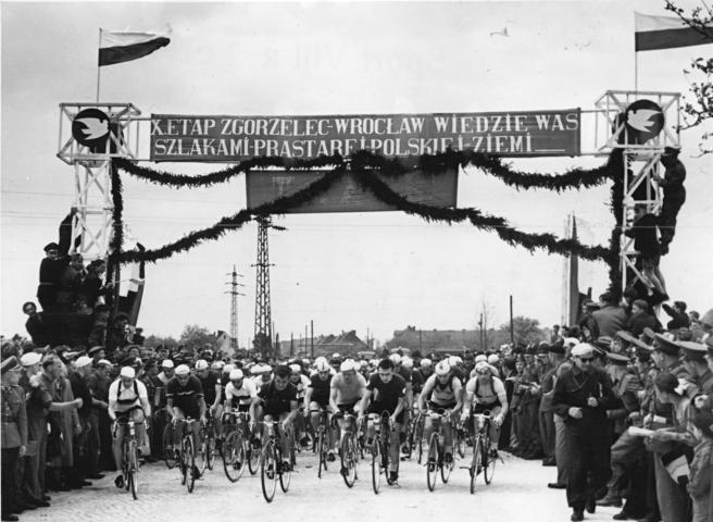 VIII. Friedensfahrt, Grenzüberfahrt Zentralbild CAF-V So-Ku 18.5.1955 - Die VIII. Internationale Friedensfahrt Prag-Berlin-Warschau 1955. Am 14. Mai erreichten die Friedensfahrer die Volksrepublik Polen. UBz: Der Start zur 10. Etappe in der Grenzstadt Zgorzelec. Die Inschrift auf dem Spruchband lautet: "Die 10. Etappe Zgorzelec - Wroclaw führt Euch durch die alten polnischen Gebiete".